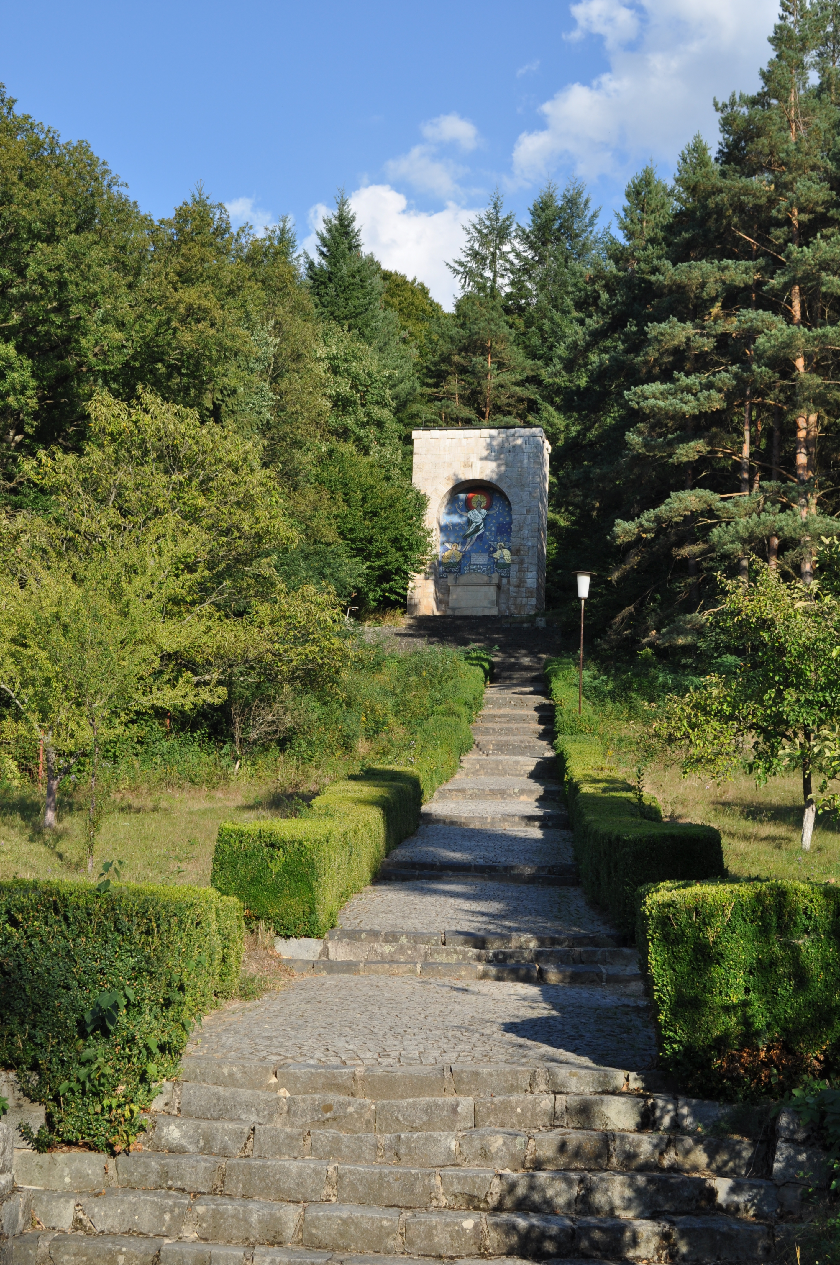 Mausoleul Octavian Goga 03